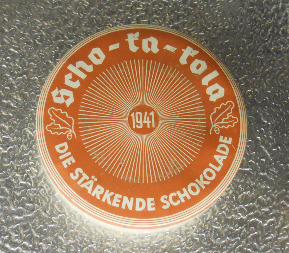 Dose Schokakola